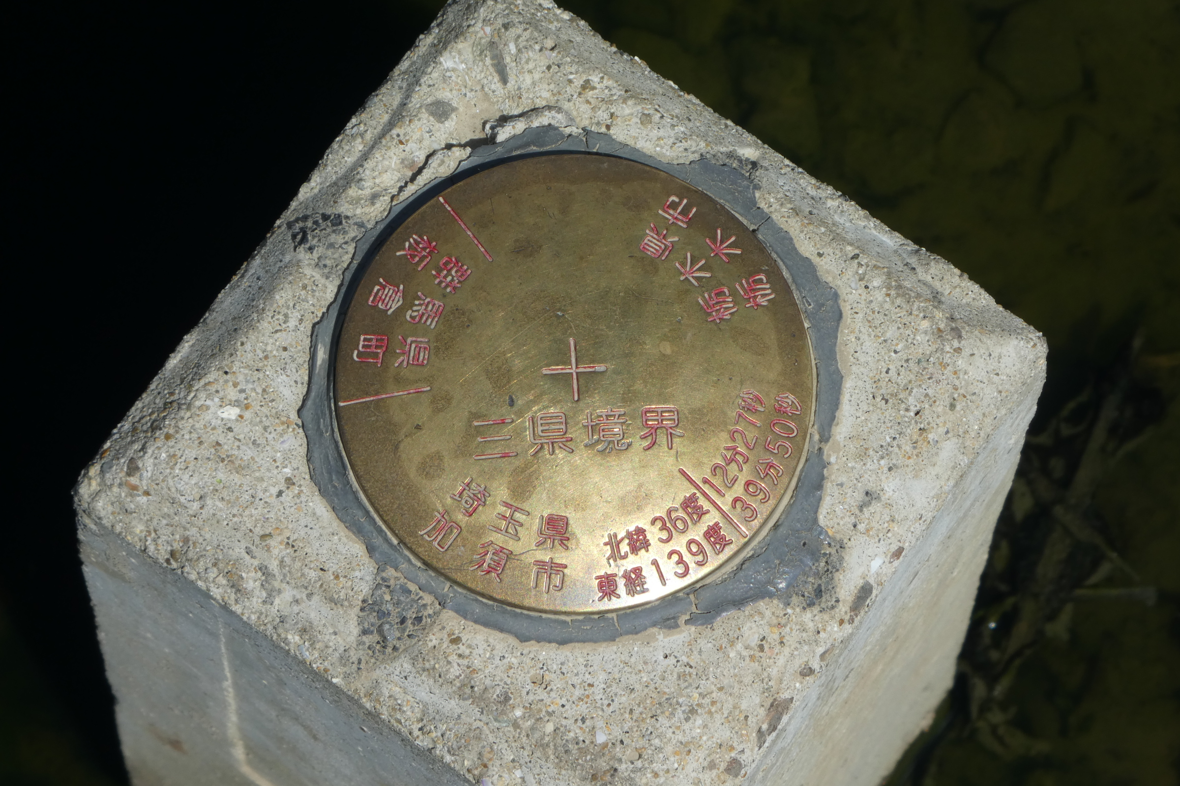 栃木県、群馬県、埼玉県の三県境を示す杭。